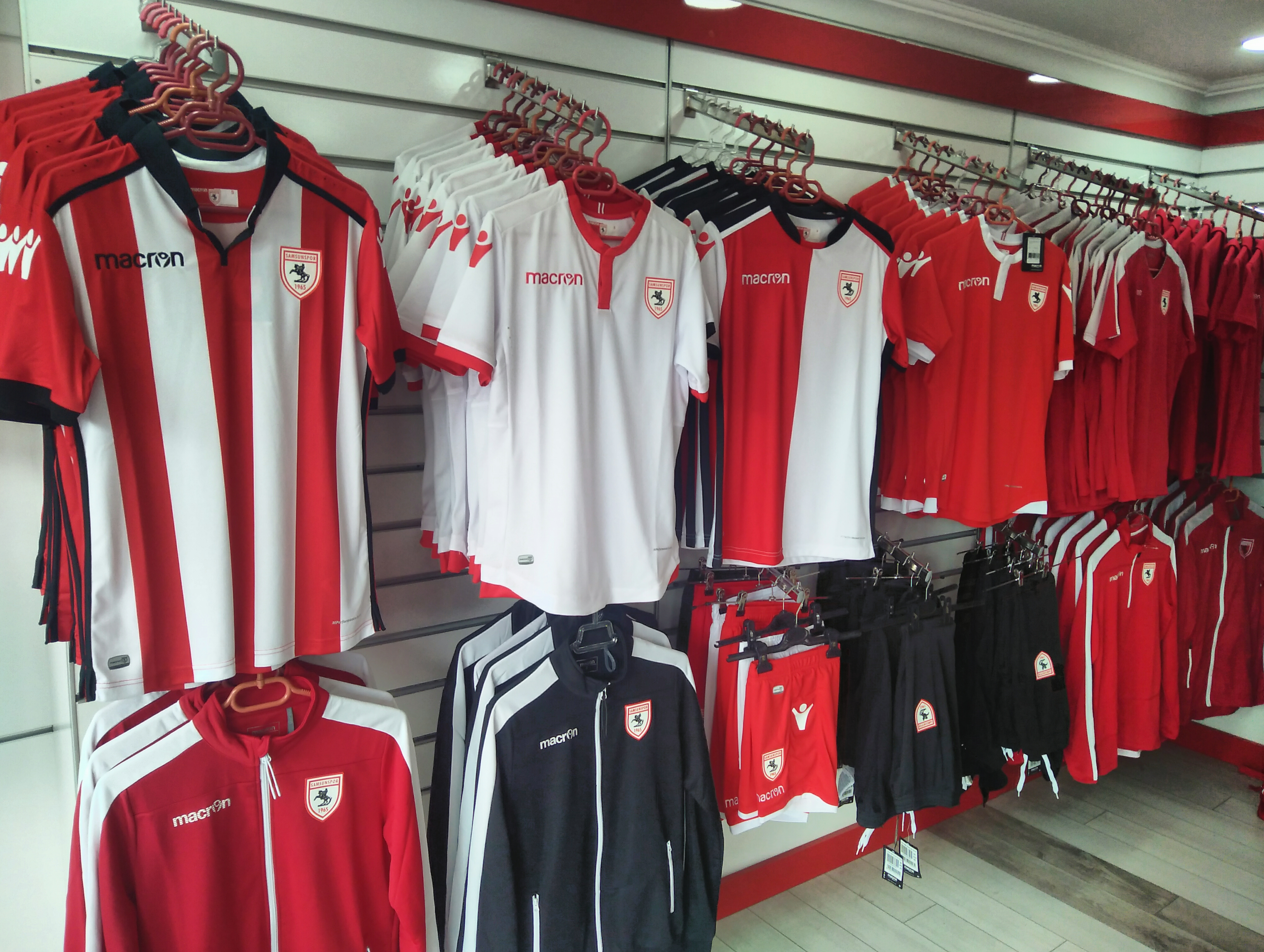 Samsunspor Store'daki 2018-19 sezonu forma reyonu.